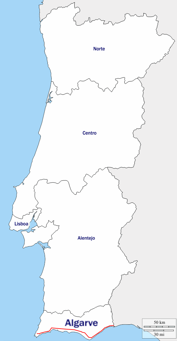 Route N125 au Portugal